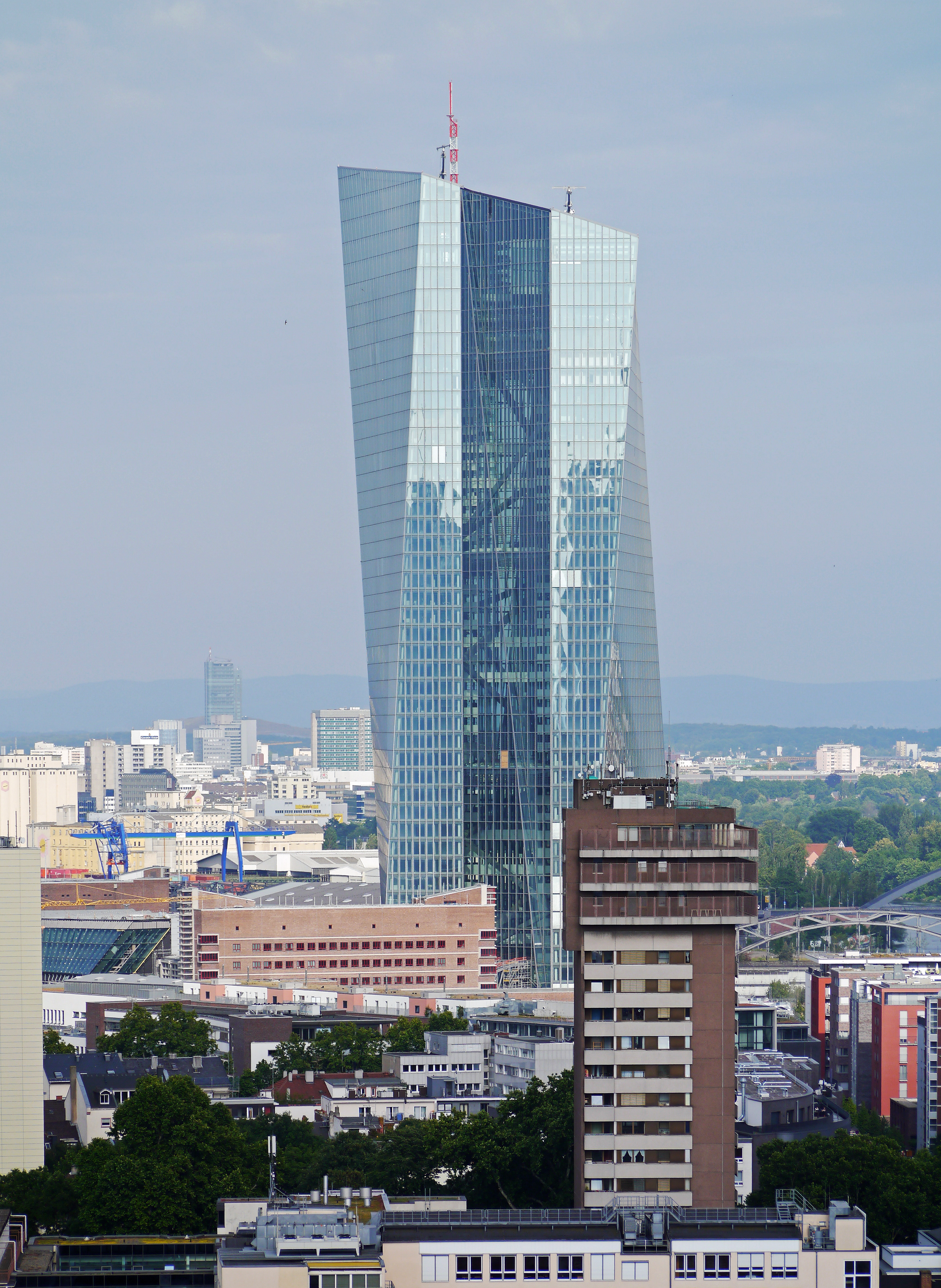 Die EZB-Neubaustelle, Juni 2014, vom Domturm in Frankfurt am Main.